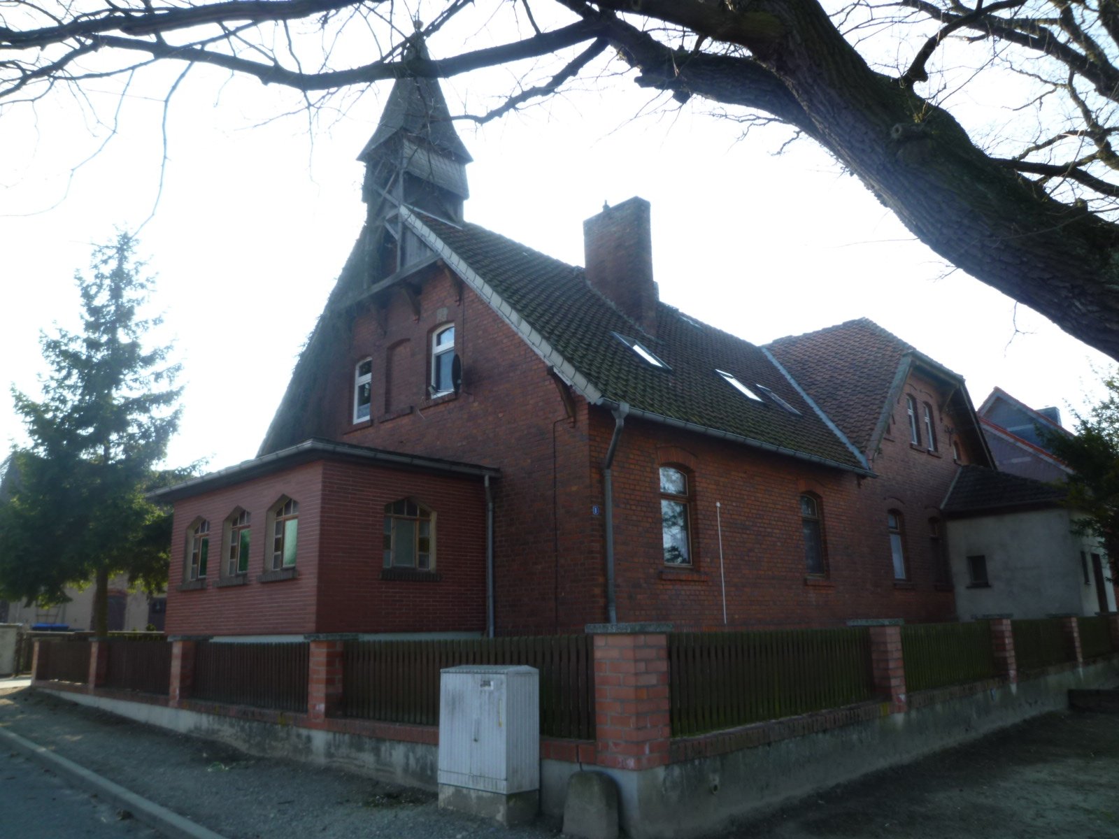 Das ehemalige Schulhaus in Mannhausen (Calvörde) 2011